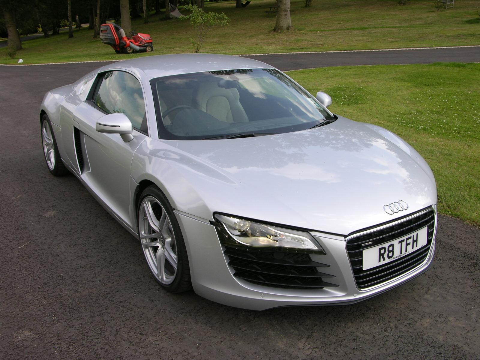 Auto R8